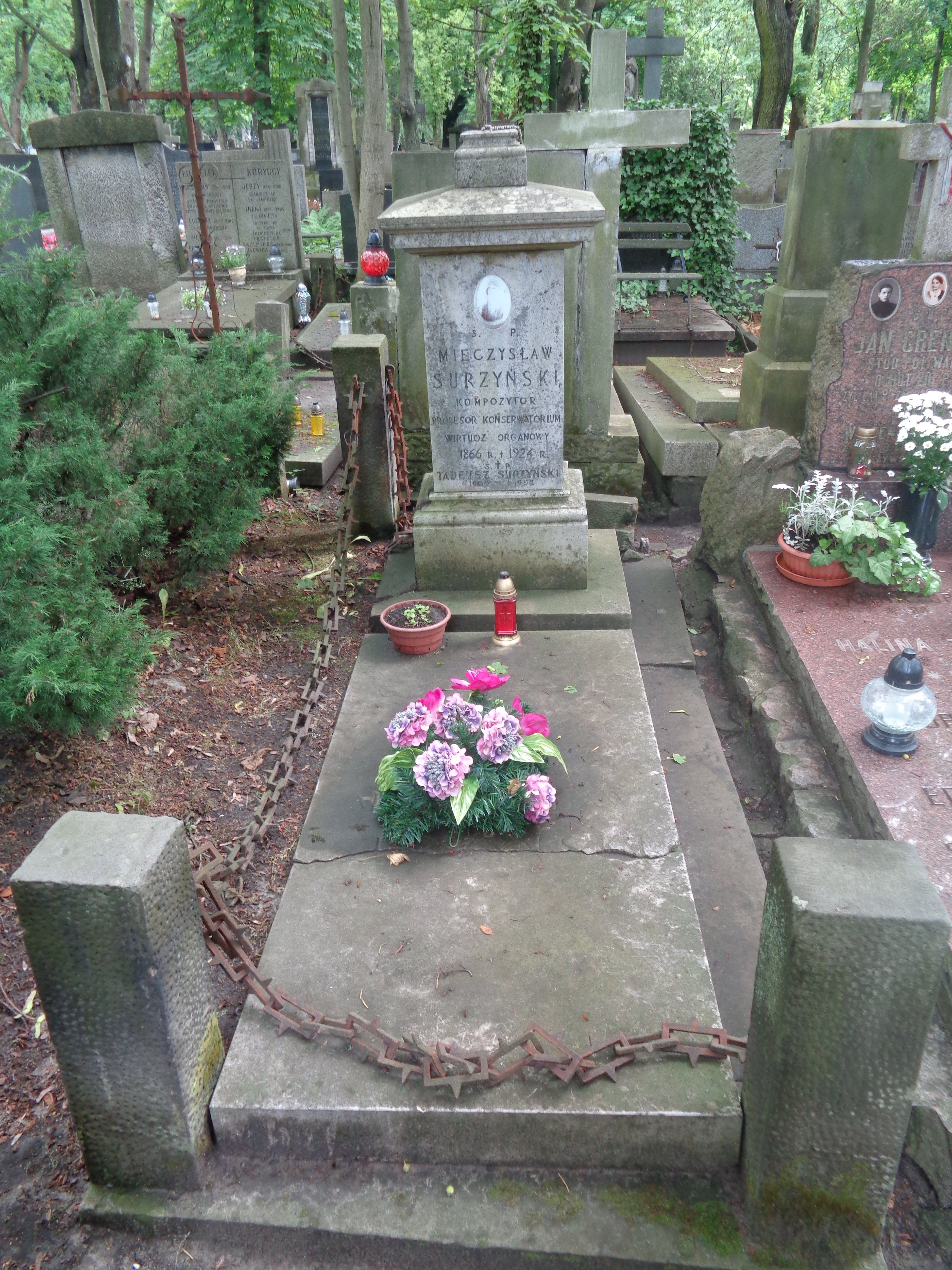 Grób Mieczysława Surzyńskiego na Cmentarzu Powązkowskim